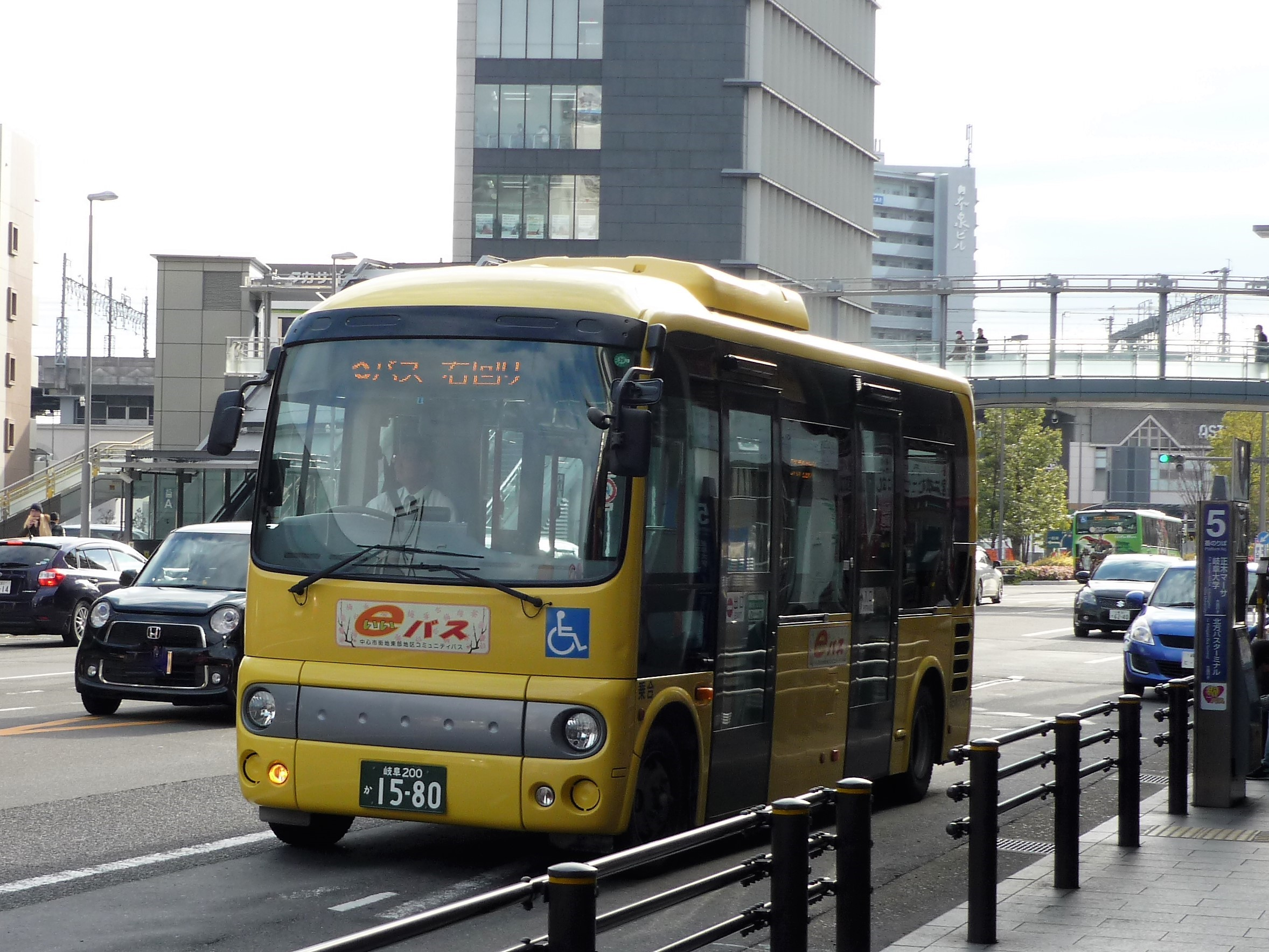 岐阜市のコミュニティバス・いいバス（名鉄岐阜にて）